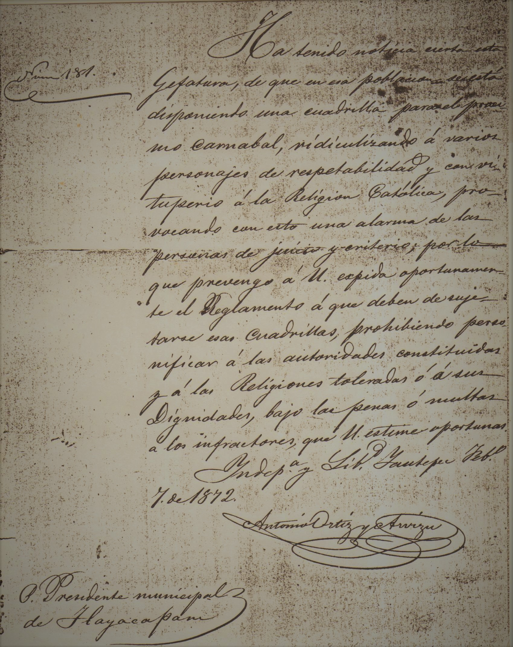 Documento del archivo histórico de Tlayacapan.